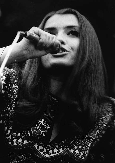 Miluše Voborníková (1969)